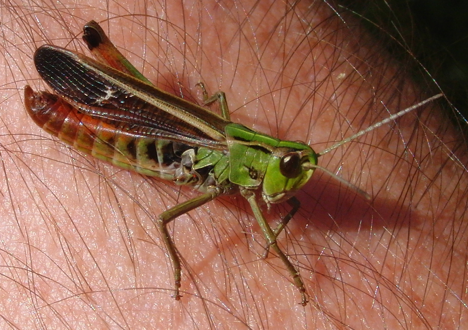 Stenobothrus lineatus, m., Balderschwang, Bayern, Deutschland